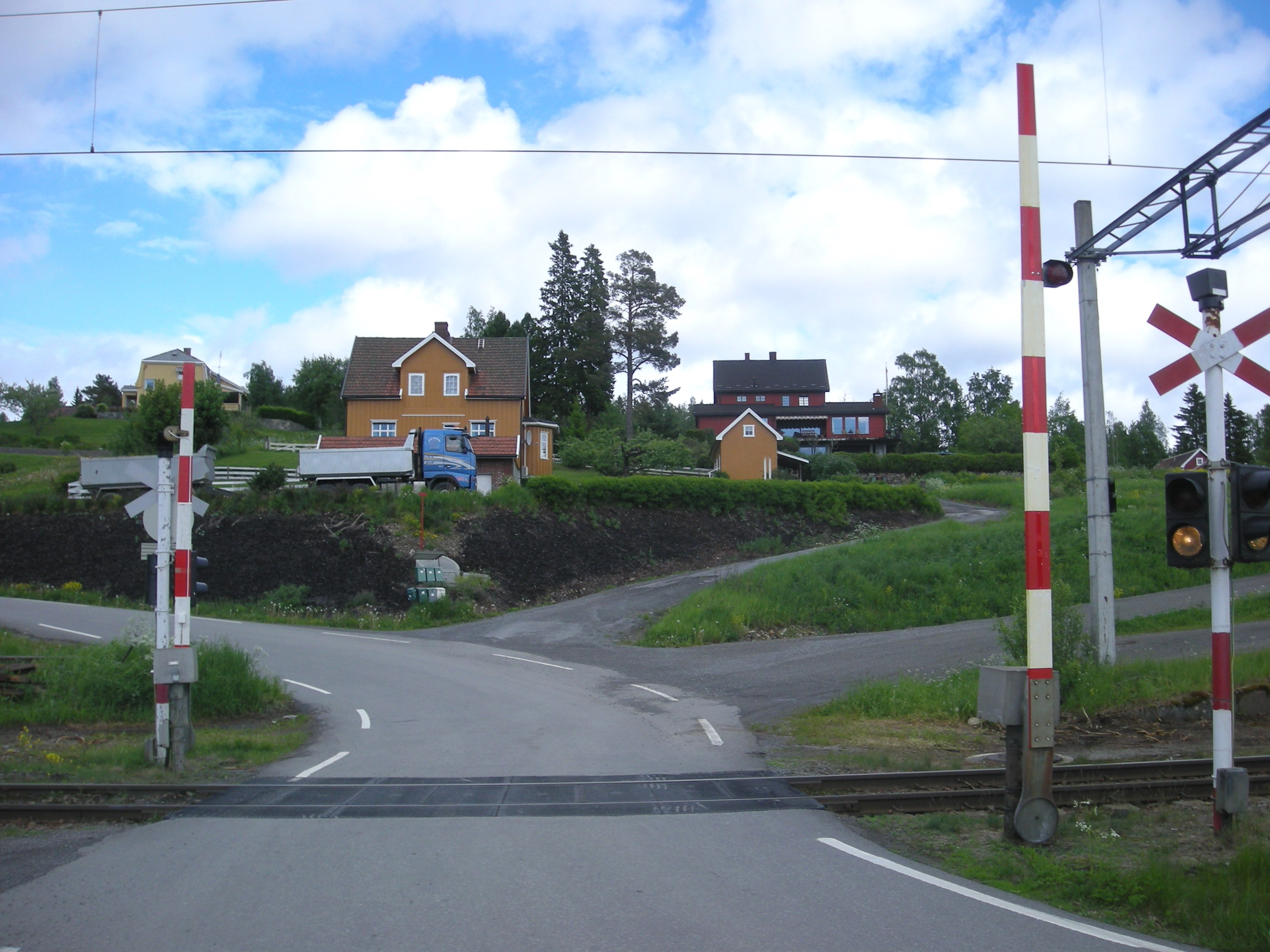 FV2318 (tidl. FV44) krysser Gjøvikbanen ved Bleiken stasjon.